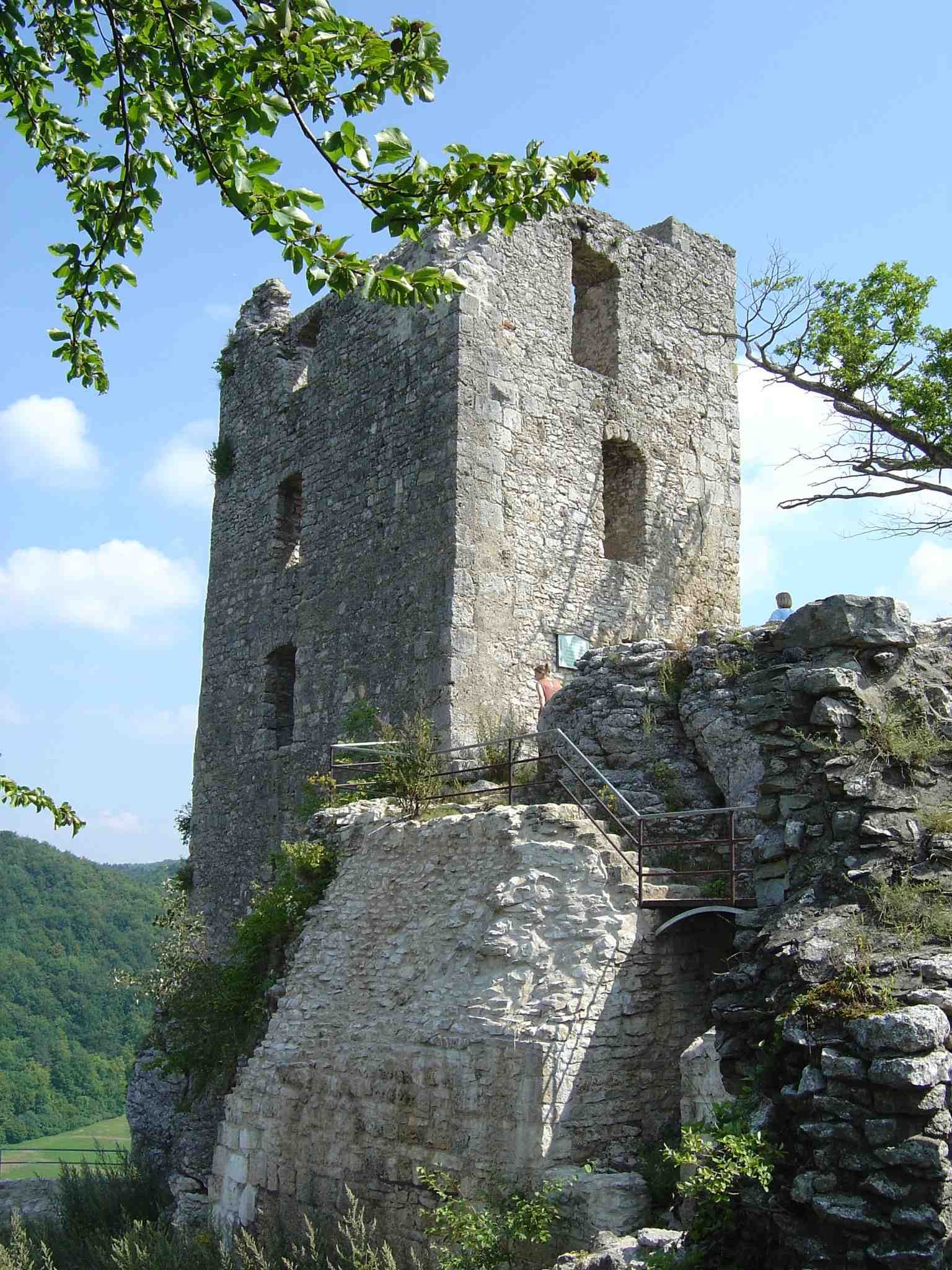 Burgruine Neideck, Streitberg, fränkische Schweiz, Juli 2003